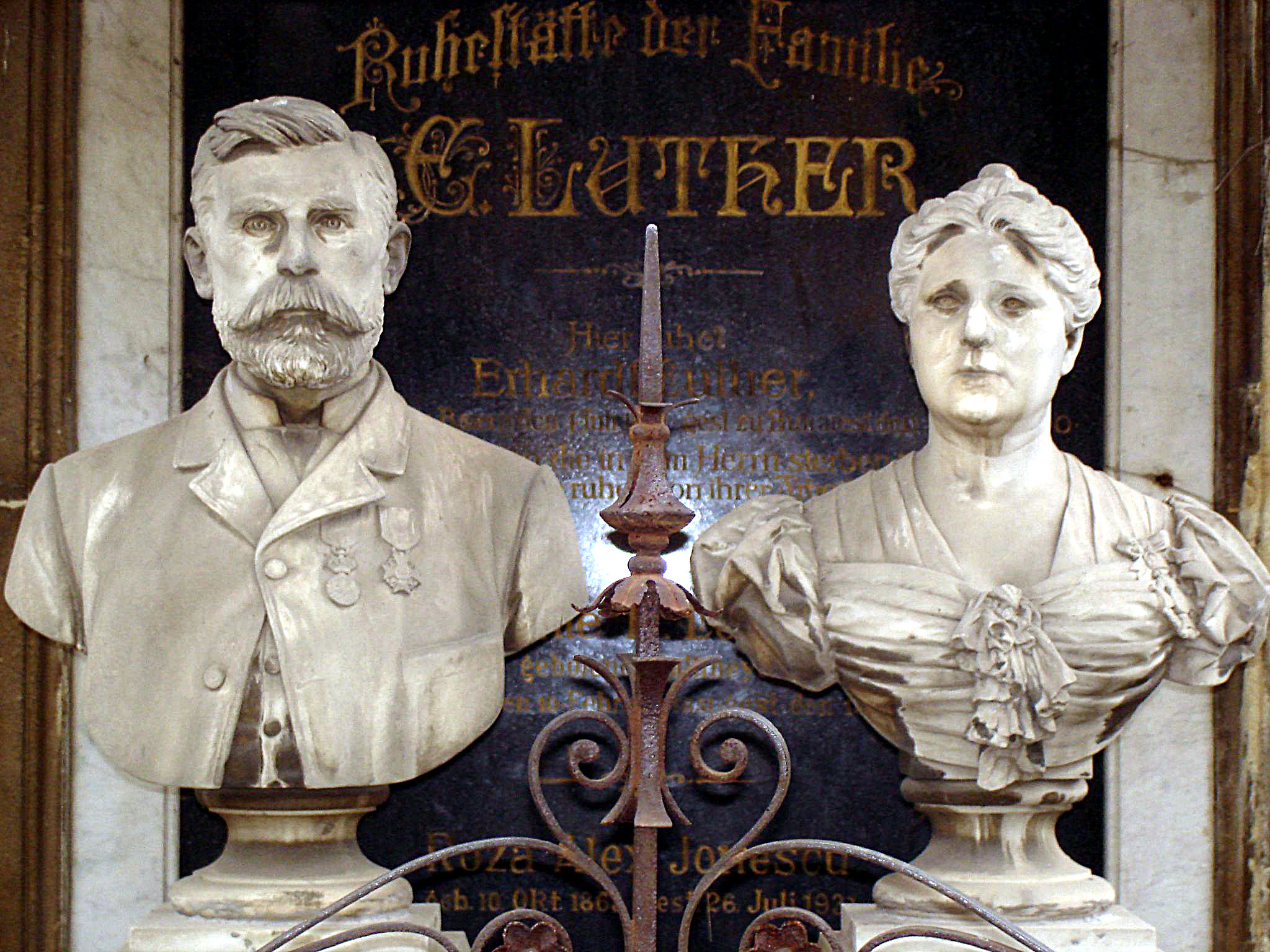 Monumentul funerar al familiei F. Luther, Cimitirul Evanghelic Bucuresti (detaliu)